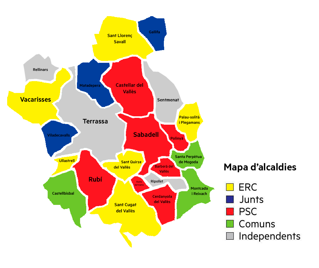 Alcaldies dels diferents municipis del Vallès Occidental després de les eleccions municipals de 2019.